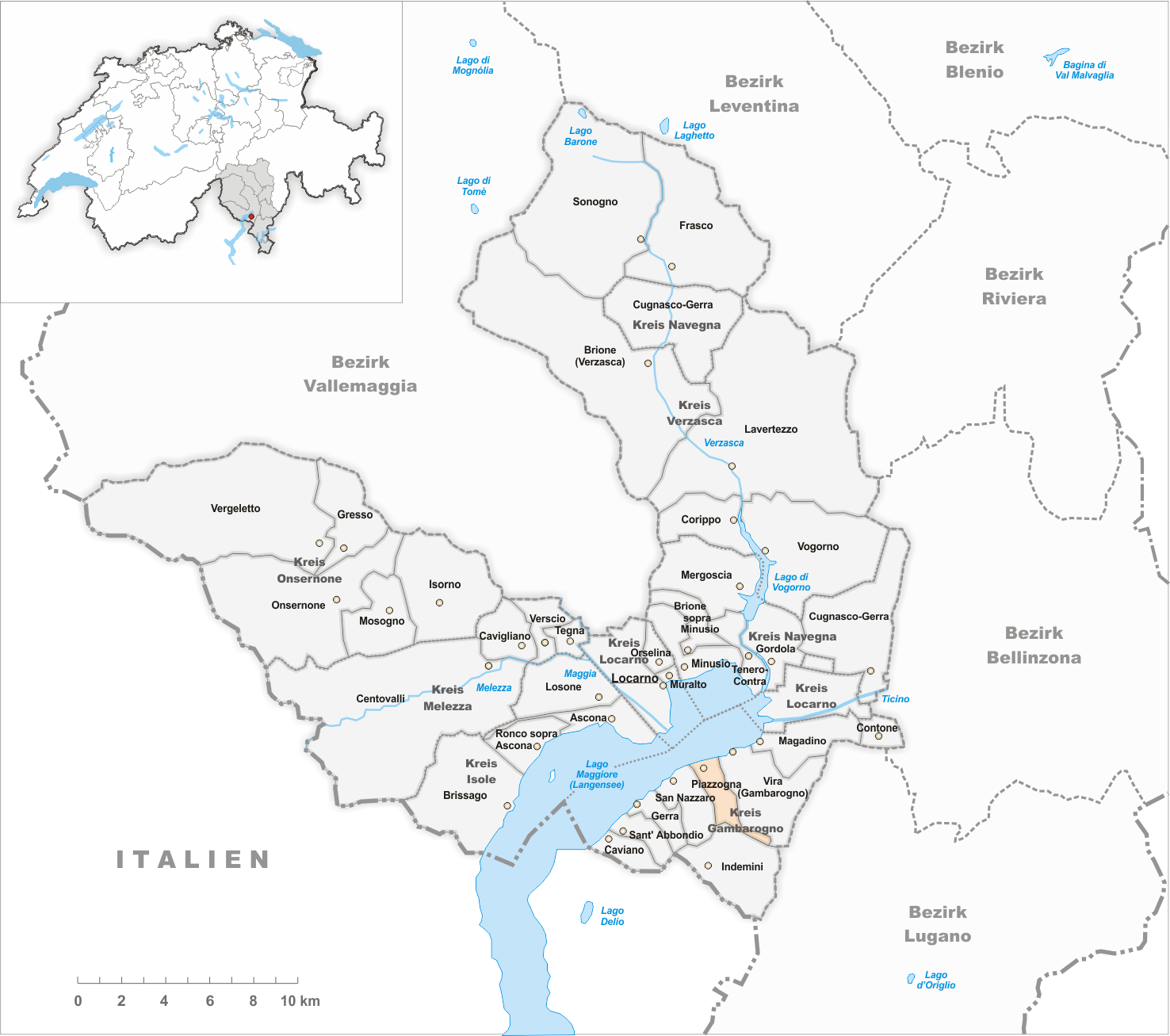 Municipality Piazzogna Artist: Tschubby